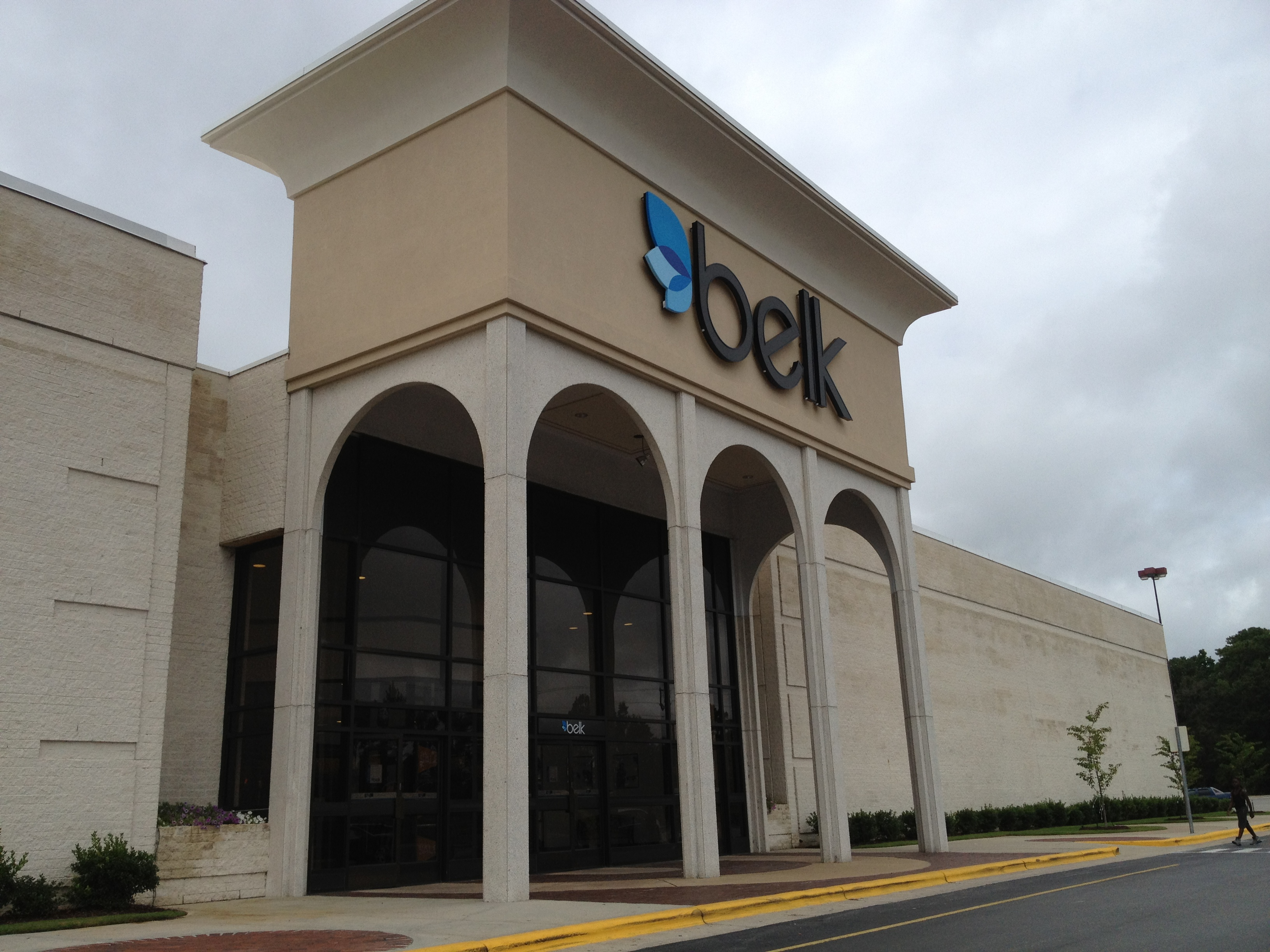 Belk - New Bern Mall